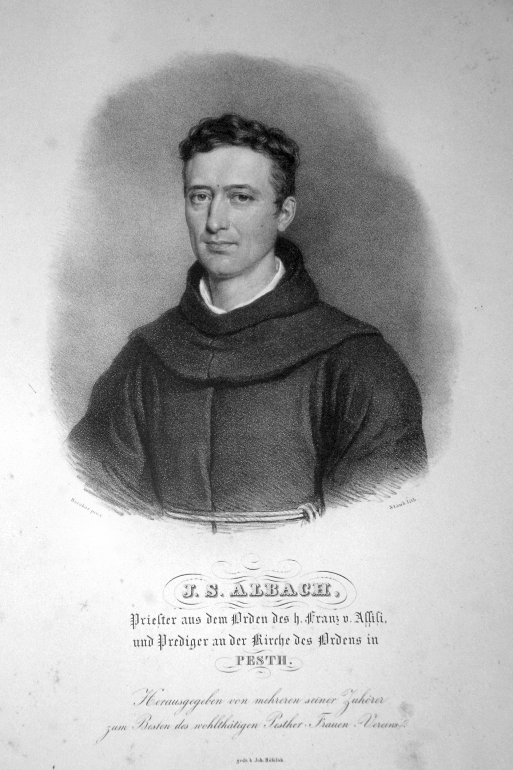 Josef Stanislaus Albach (1795-1853), Franziskaner, bekannter Prediger. Lithographie, nach Barabas.